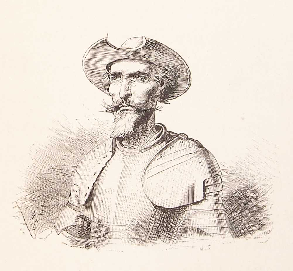 "Don Quixote" — Edición anotada por Nicolás Díaz de Benjumea e ilustrada por Ricardo Balaca (1880-1883). 202_056_quijote_cap21